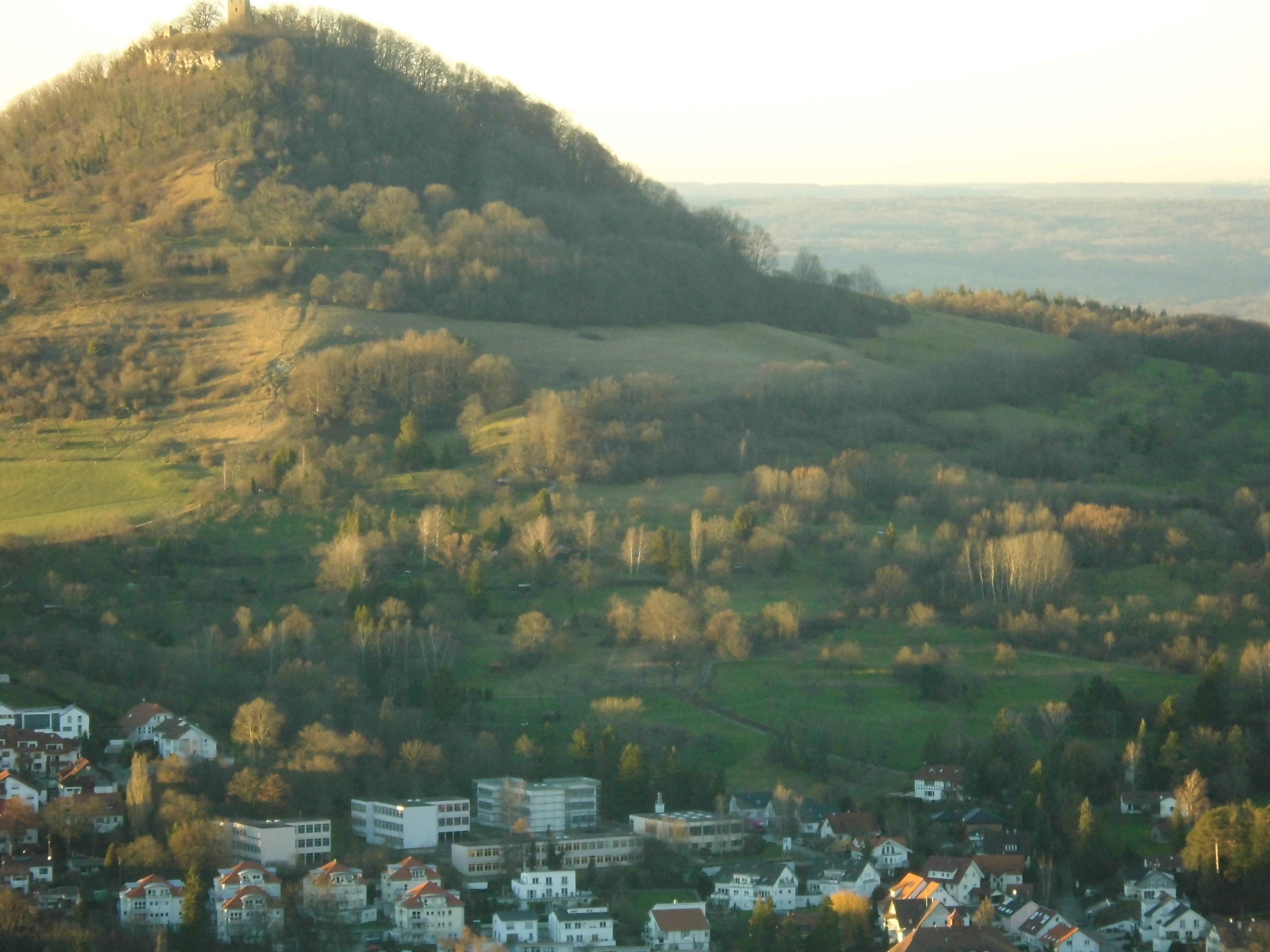 Blick vom Aussichtspunkt Sonnwendfeuer am Drackenberg oberhalb des Naturfreundehaus Eningen unter Achalm Oben: Achalm mit wohlgeschichteten Kalkbänken, Bildmitte: Naturschutzgebiet Wagenhals, Unten: Eningen unter Achalm